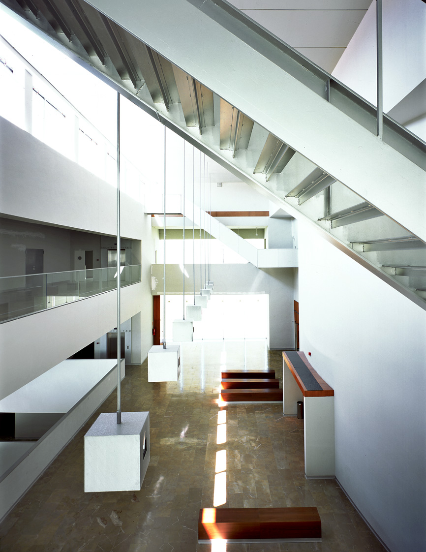 MARIANO BAYÓN Centro de Artes Escénicas de Salamanca